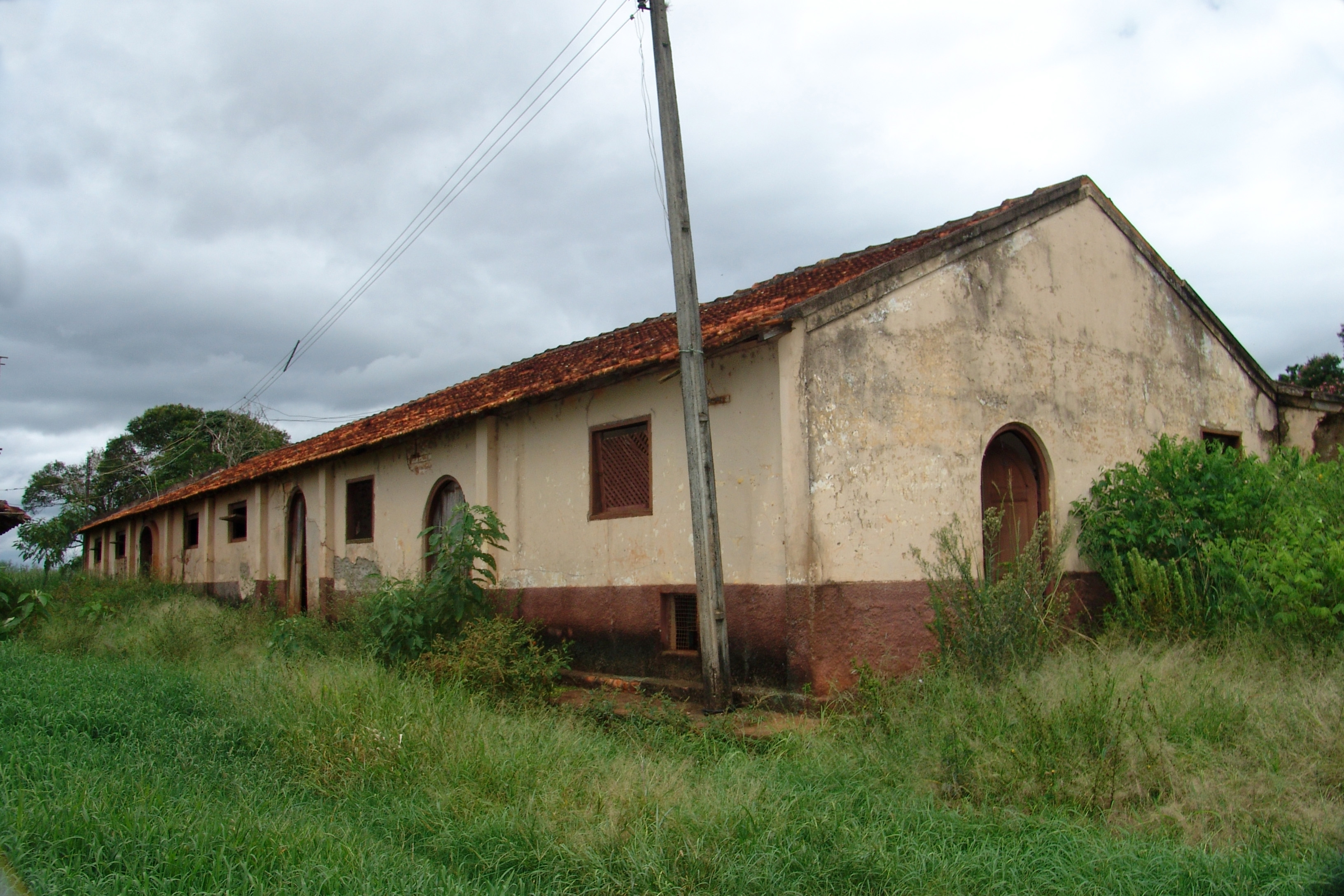 Foto do município de Campina do Monte Alegre, São Paulo, Brasil